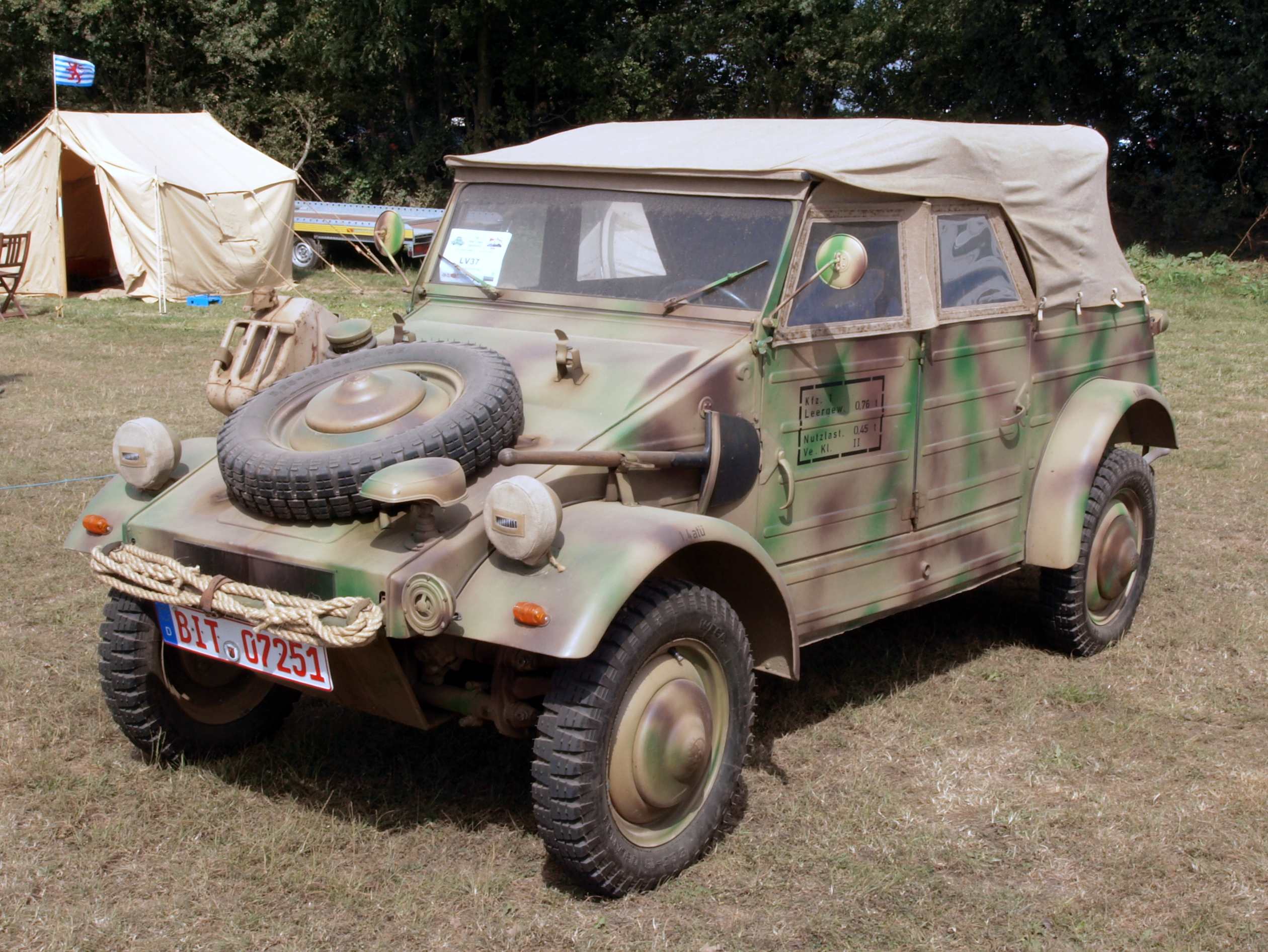 VW Kubelwagen Type 82 (1944) (owner Hermann Muller)